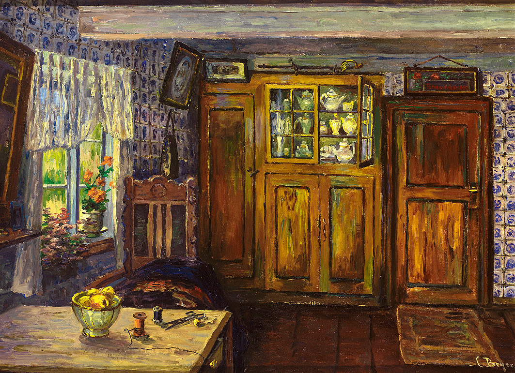 Clarita Beyer: Interieur einer Fischerstube auf den Halligen, Öl auf Leinwand; 38,5 x 52 cm